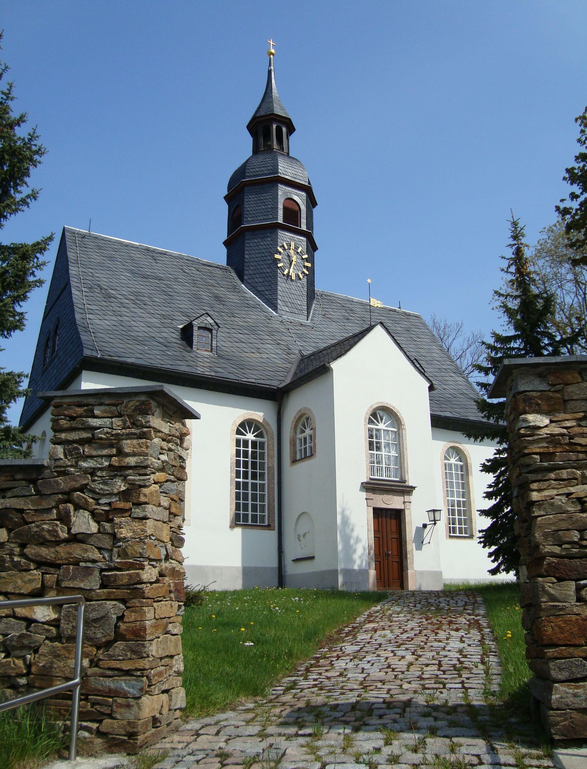 Kirche in Brünlos im Erzgebirge